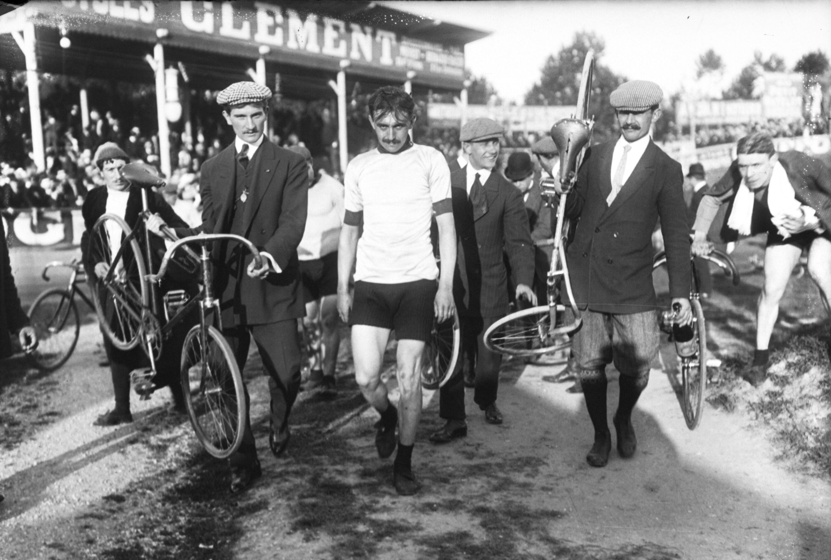 Lucien Petit-Breton en el Velódromo de Buffalo en 1909